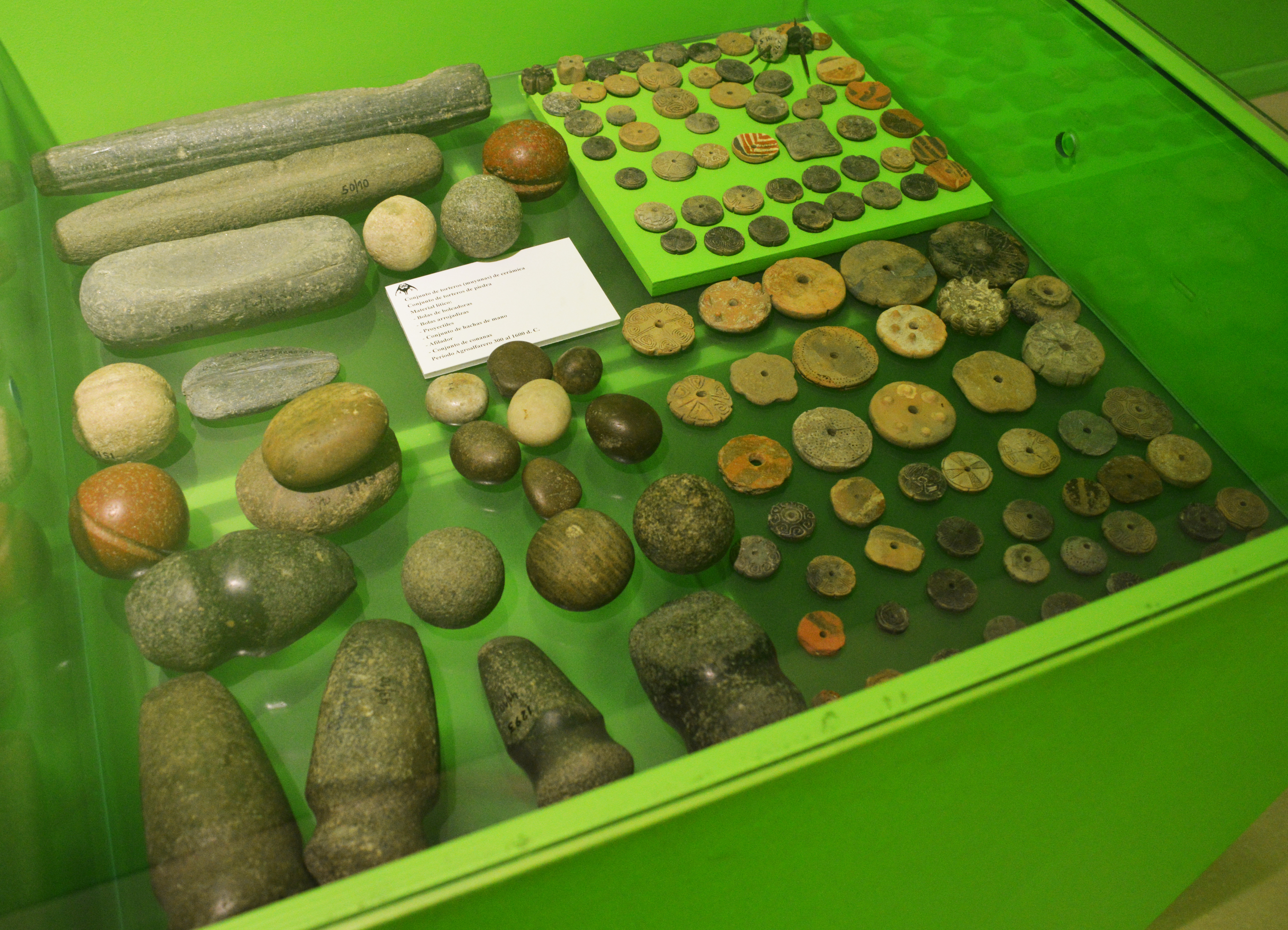 Herramientas indígenas.